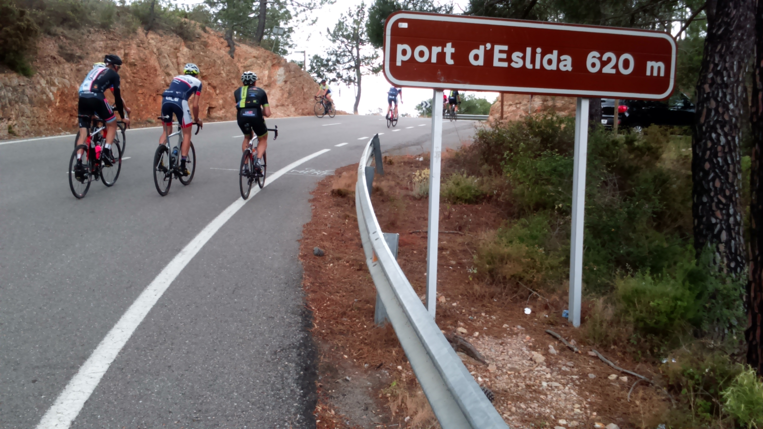 Coll d'Eslida des d'Eslida